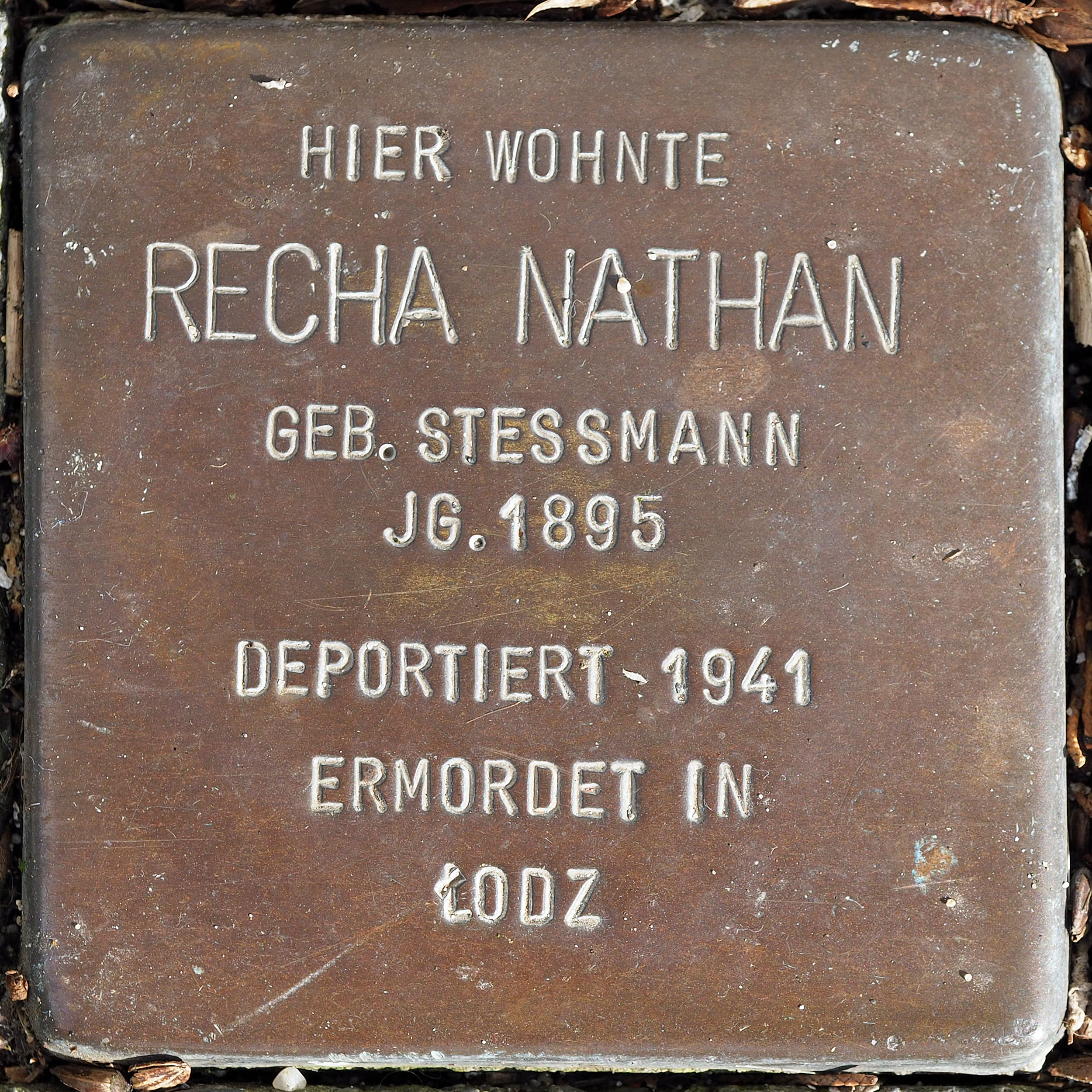 Stolperstein DU: Nathan, Recha